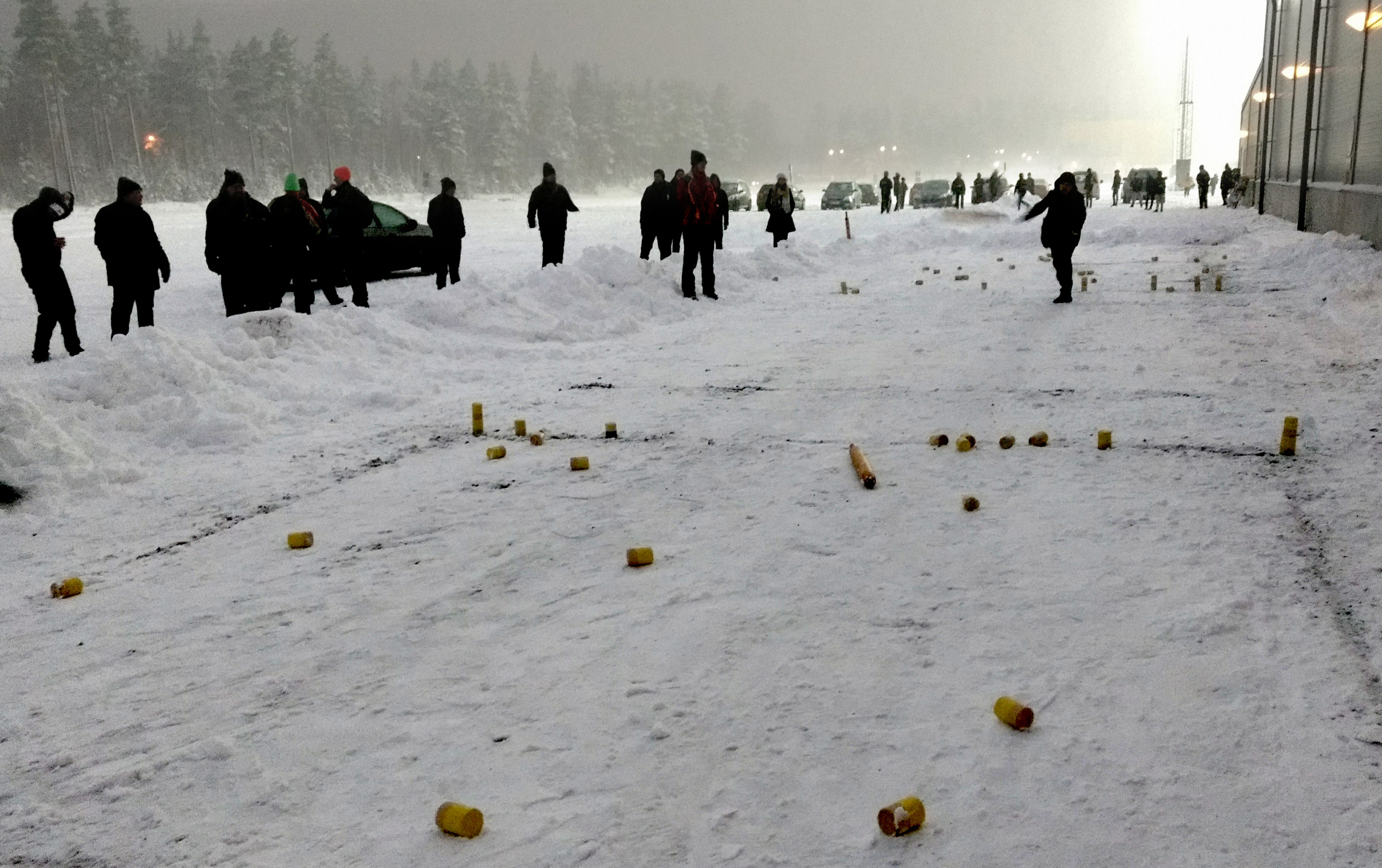 Kyykkää Lappeenrannan jäähallin alueella 1.12.2017